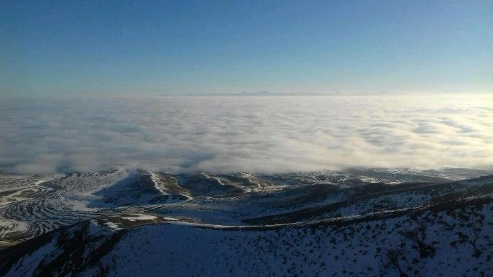 کمیجان در هاله از ابر اثری متفاوت و زیبا از شهر کمیجان از سمت شمال کوههای سر به فلک کشیده کوه سفید(وفس)